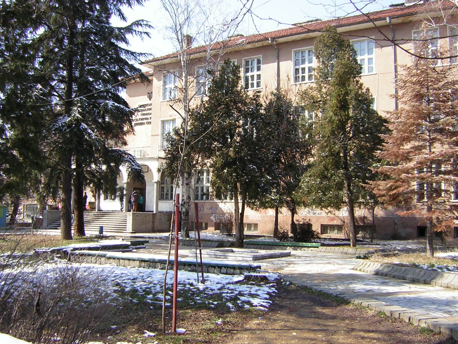 Главният вход на Националната хуманитарна гимназия „Свети Свети Кирил и Методий“